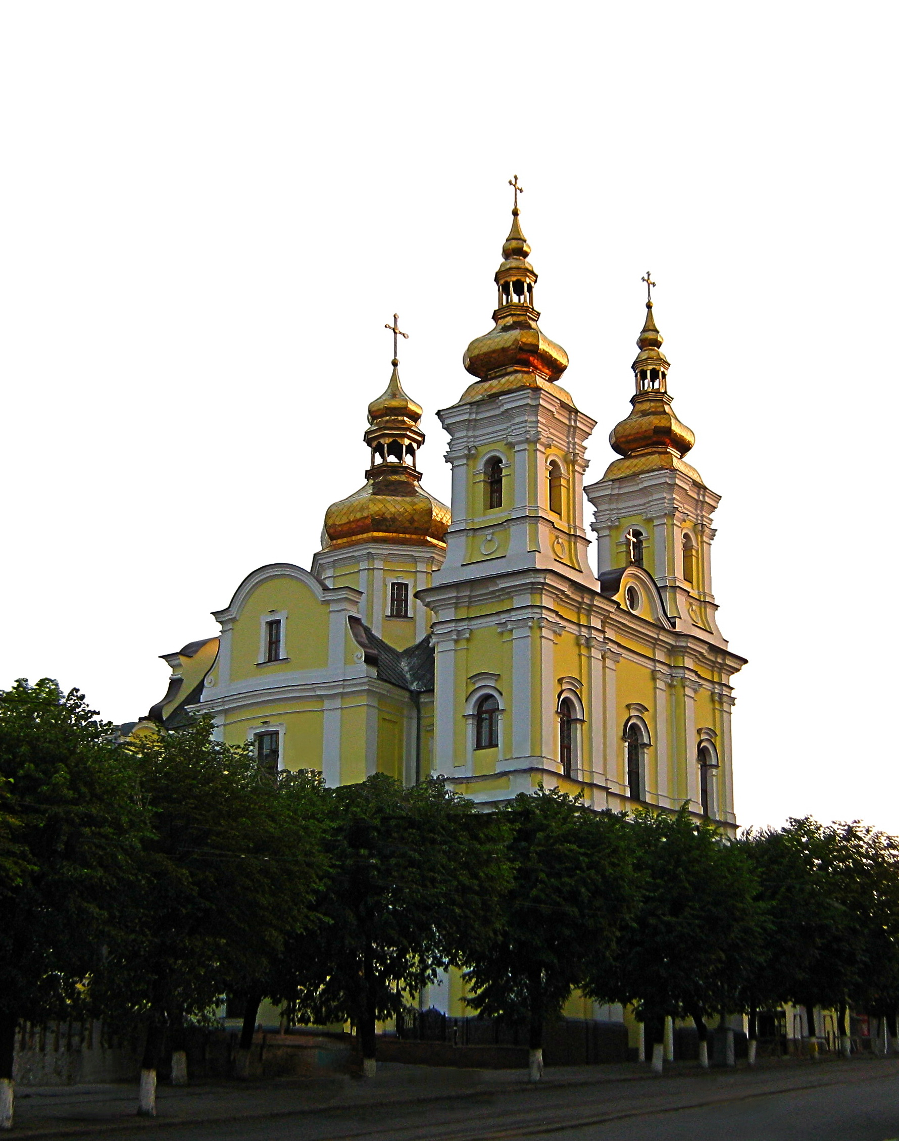 ПРЕОБРАЖЕНСКИЙ СОБОР Винницы